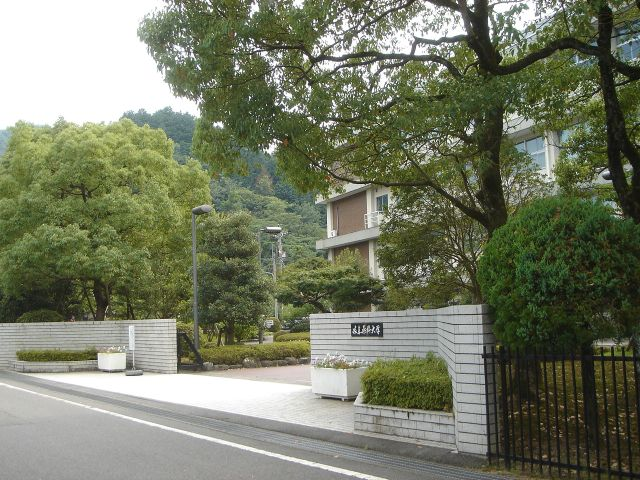 岐阜薬科大学(正門、岐阜県岐阜市) 撮影：投稿者(Monami)、撮影日：2005年7月